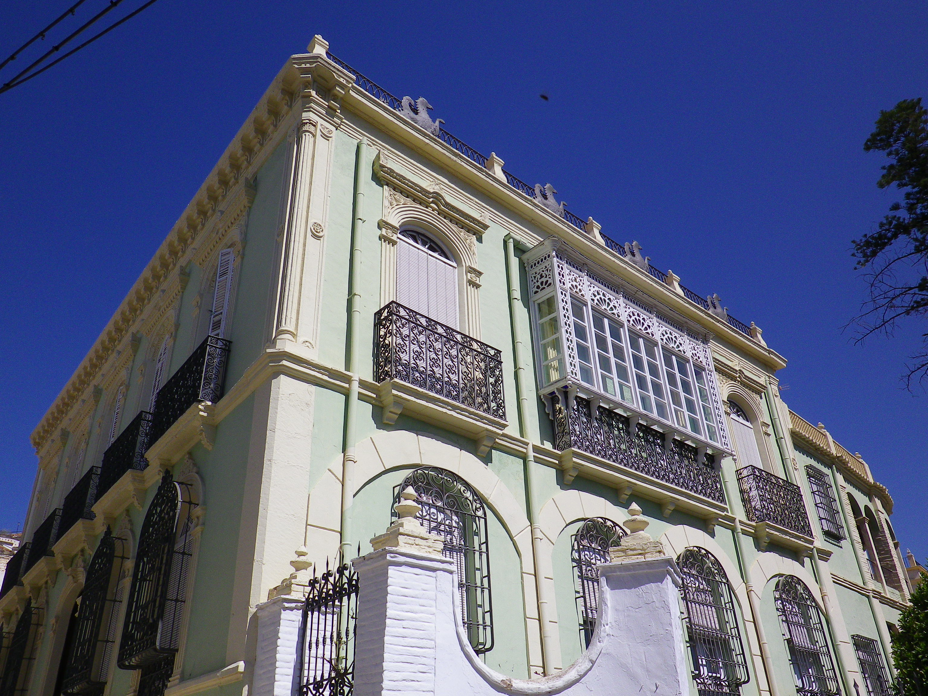 Fotografía de la fachada de la Casa de los Caballitos de Terque, provincia de Almería, Andalucía, España. En realidad las figuras de su fachada son grifos.